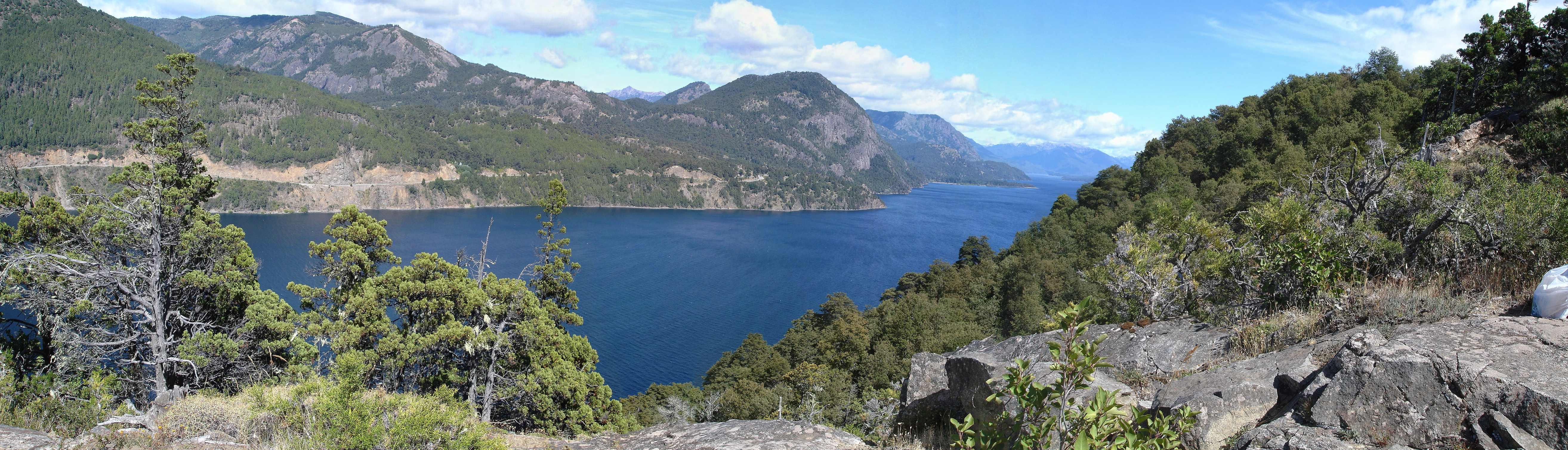 Imagen tomada el 12 de marzo de 2007, desde el Mirador Bandurrias hacia el oeste. Lago Lácar, San Martín de los Andes, Neuquén, Argentina.